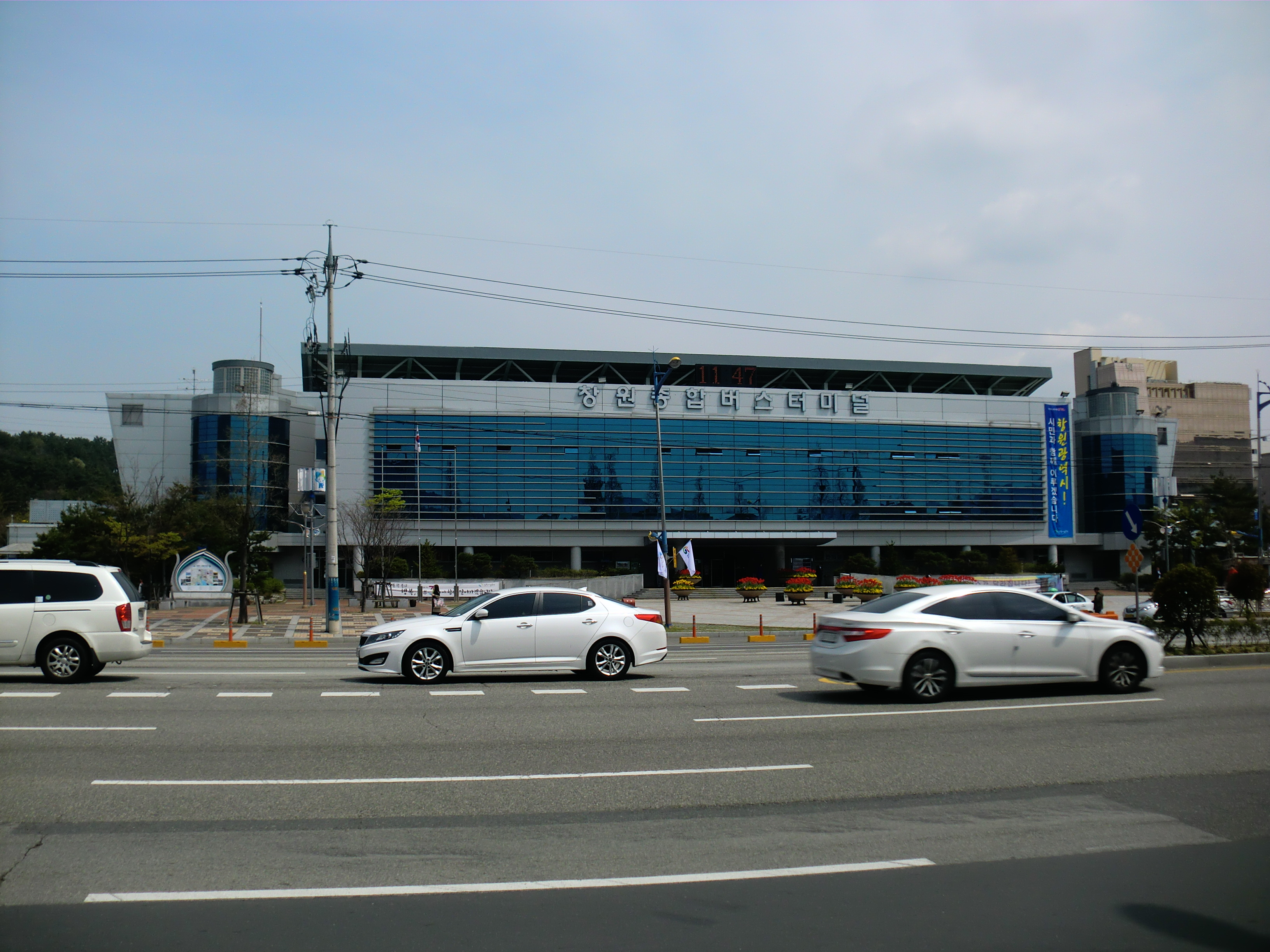 경상남도 창원시에 있는 창원종합버스터미널